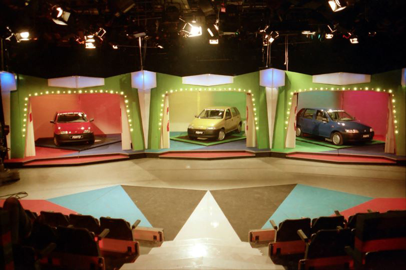 עשינו עסק פרסים